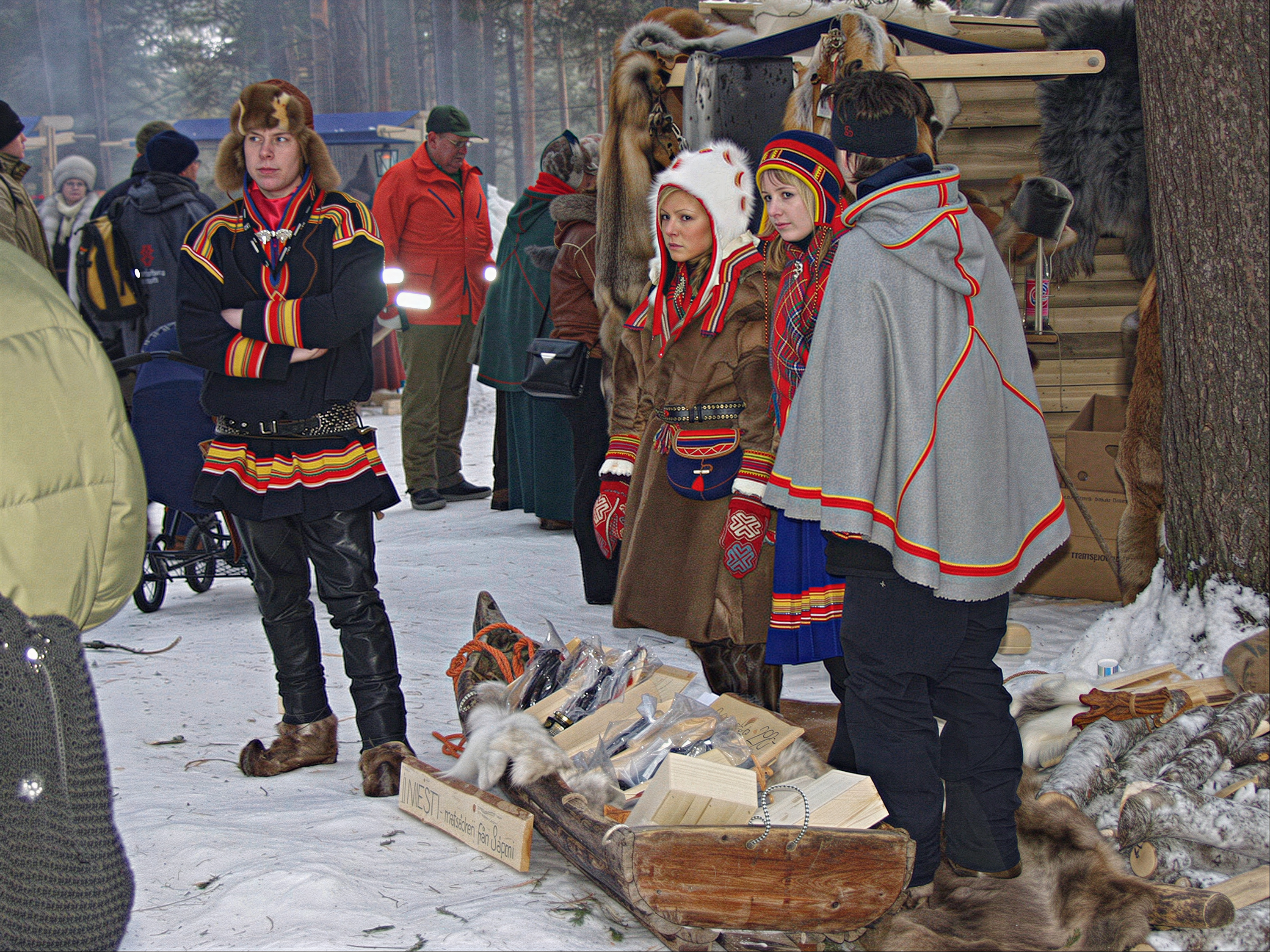 Historischer Markt beim Jokkmokksmarkt 2005